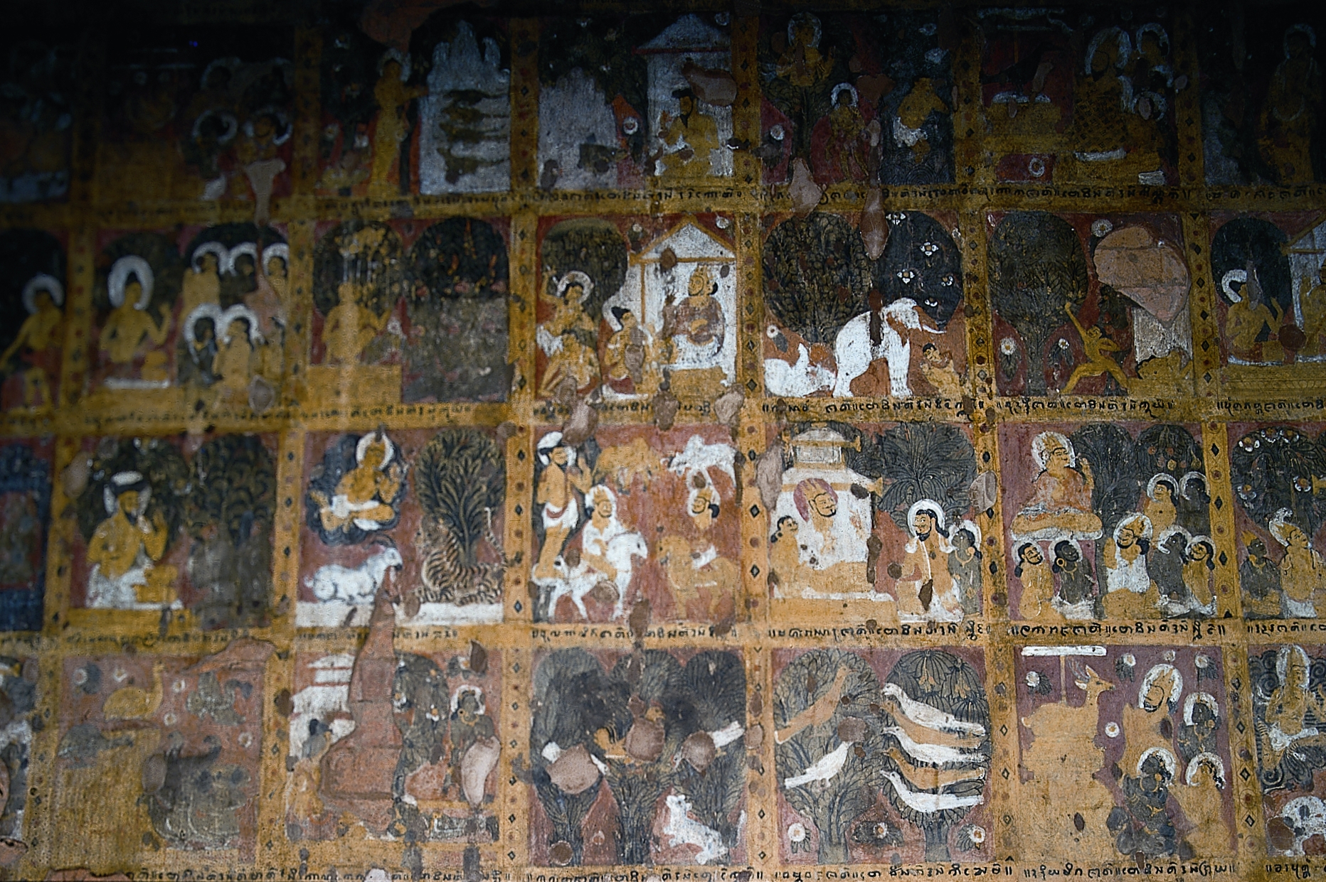 Peinture murale sur le mur extérieur du déambulatoire du Kubyauk-gyi